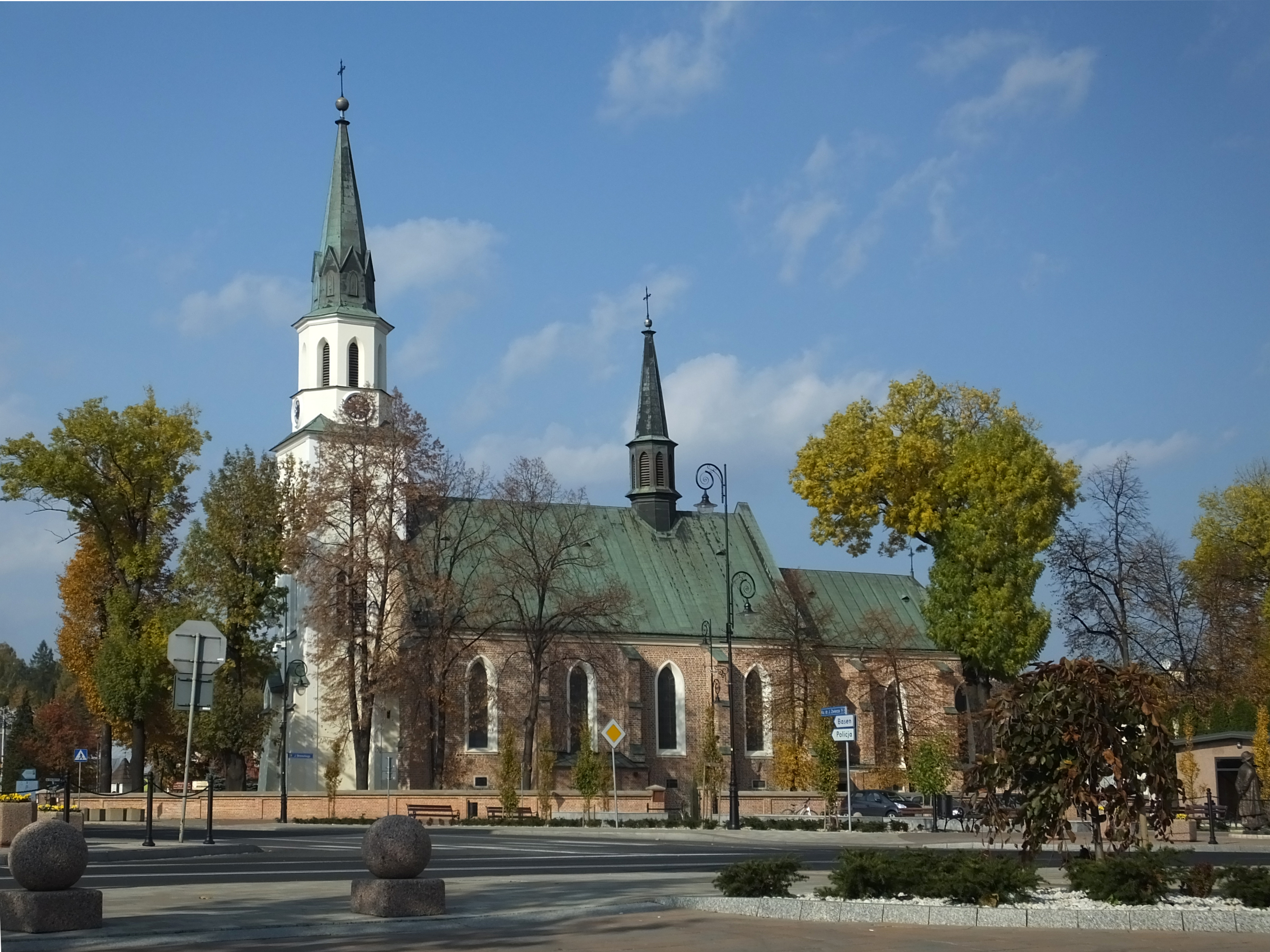 Ropczyce, zespół kościoła par. p.w. Przemienienia Pańskiego